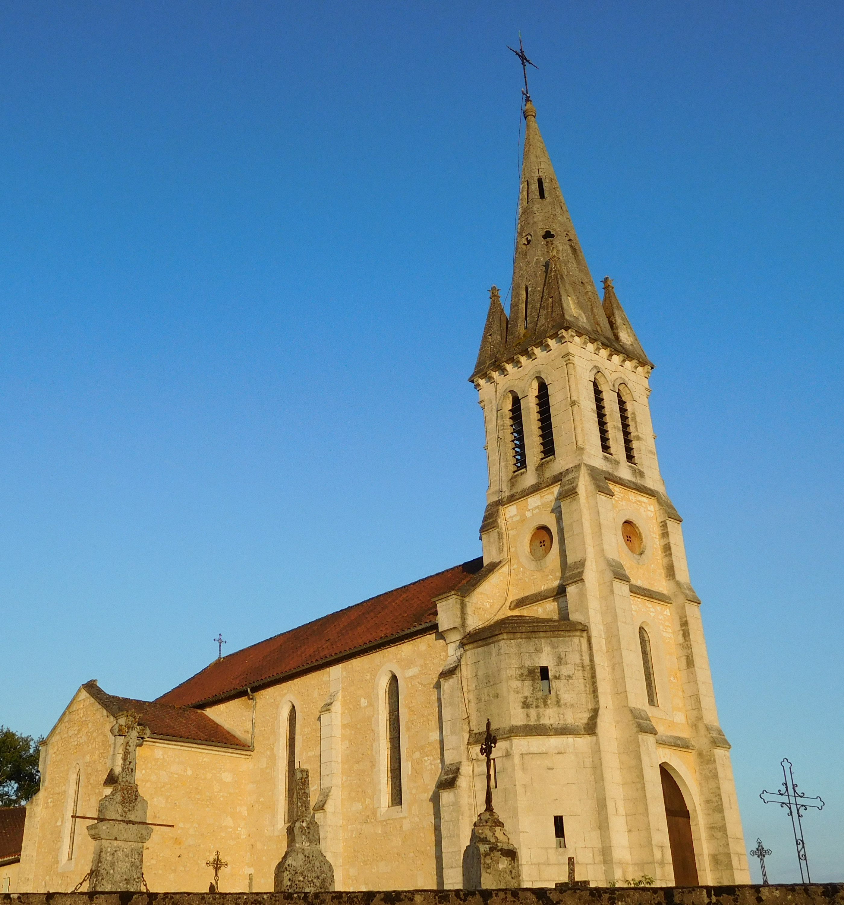 L'église Saint-Jacques de Bosset (Dordogne, France).